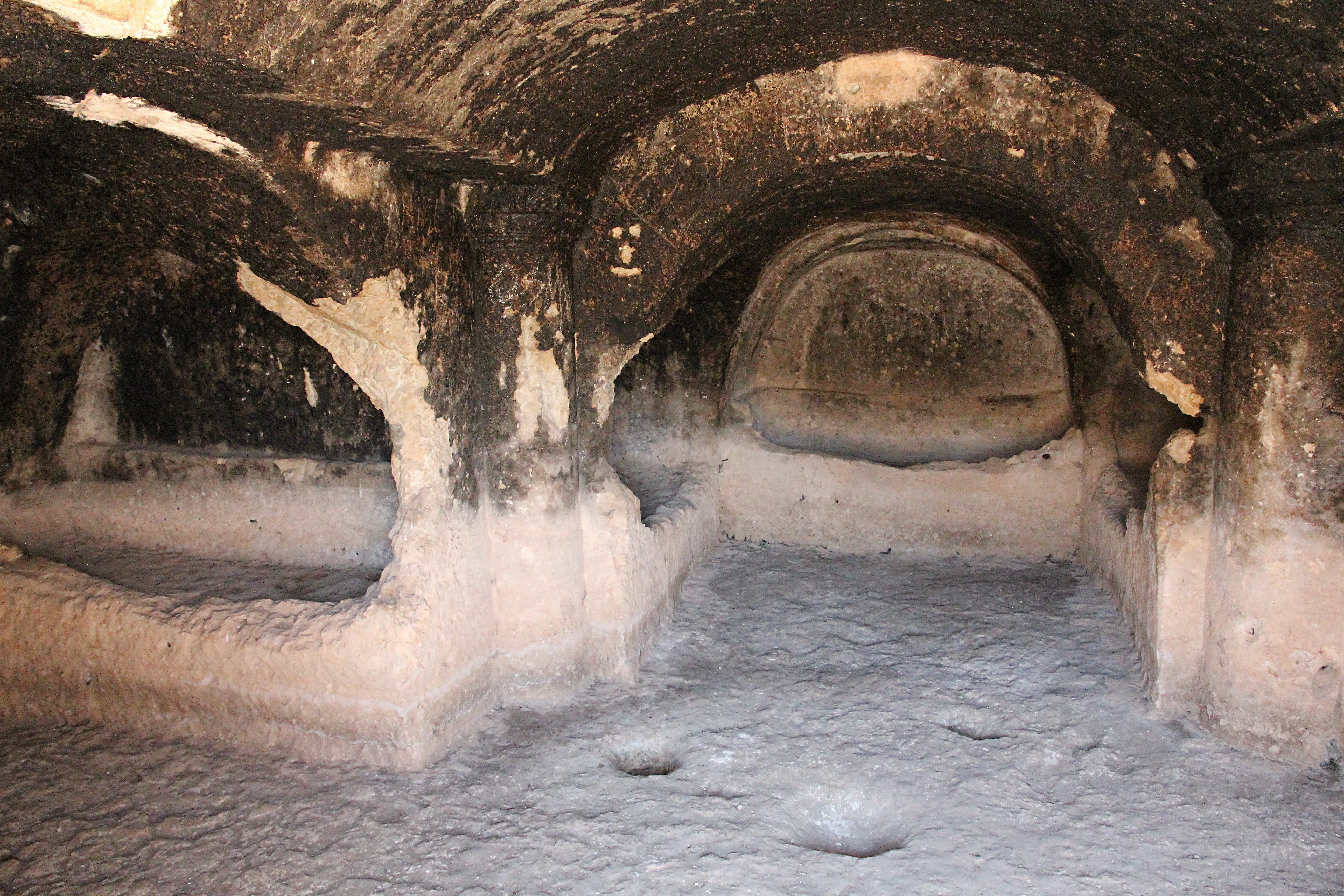 Perrhe, kommagenische Stadt bei Adıyaman, Südtürkei, Nekropole